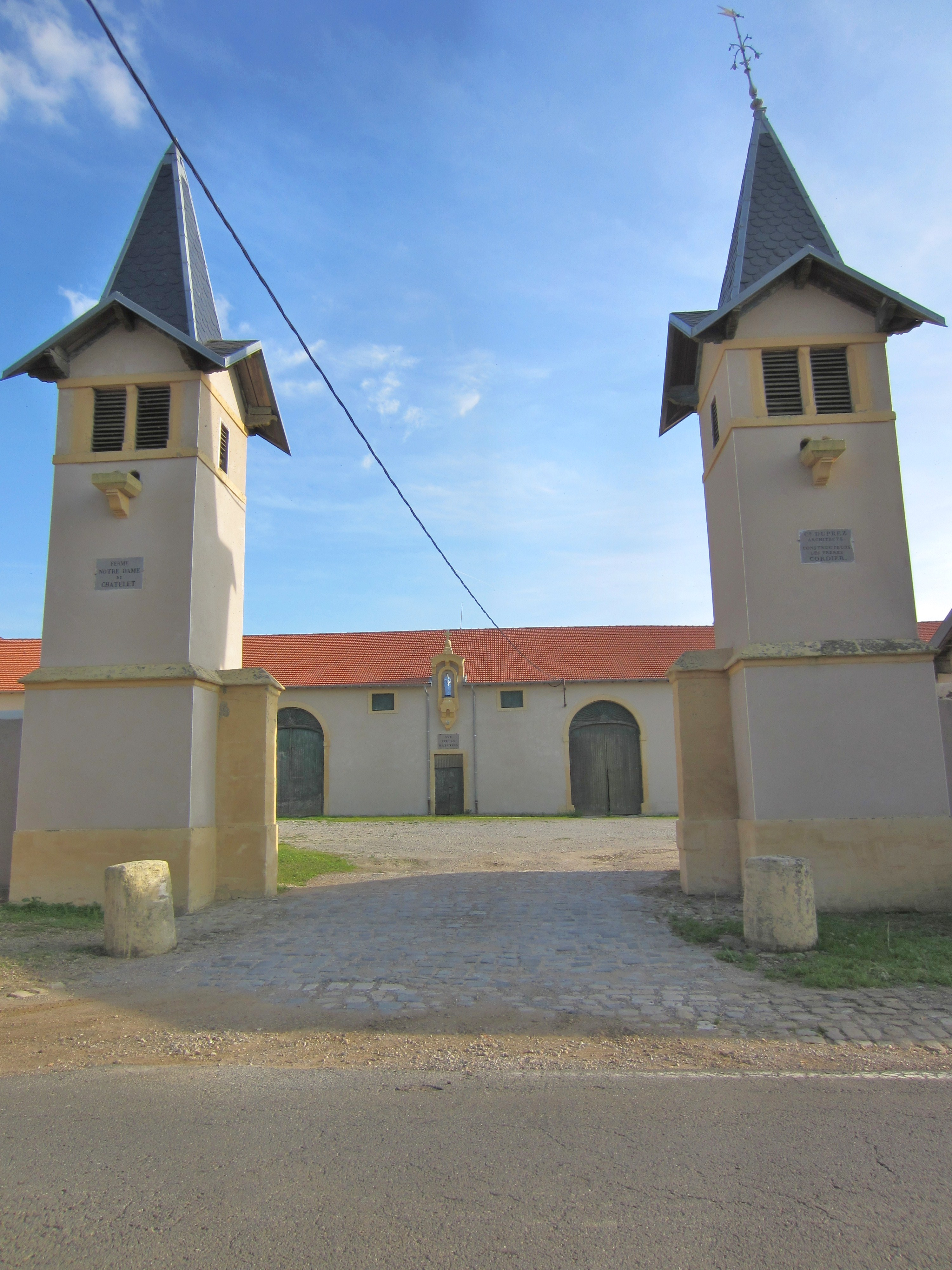 Description Ferme Notre-Dame du Castelet aux Baraques Date25 September 2011Sourcemon appareil photoAuthorAimelaimePermission (Reusing this file) Ferme Notre-Dame du Castelet aux Baraques